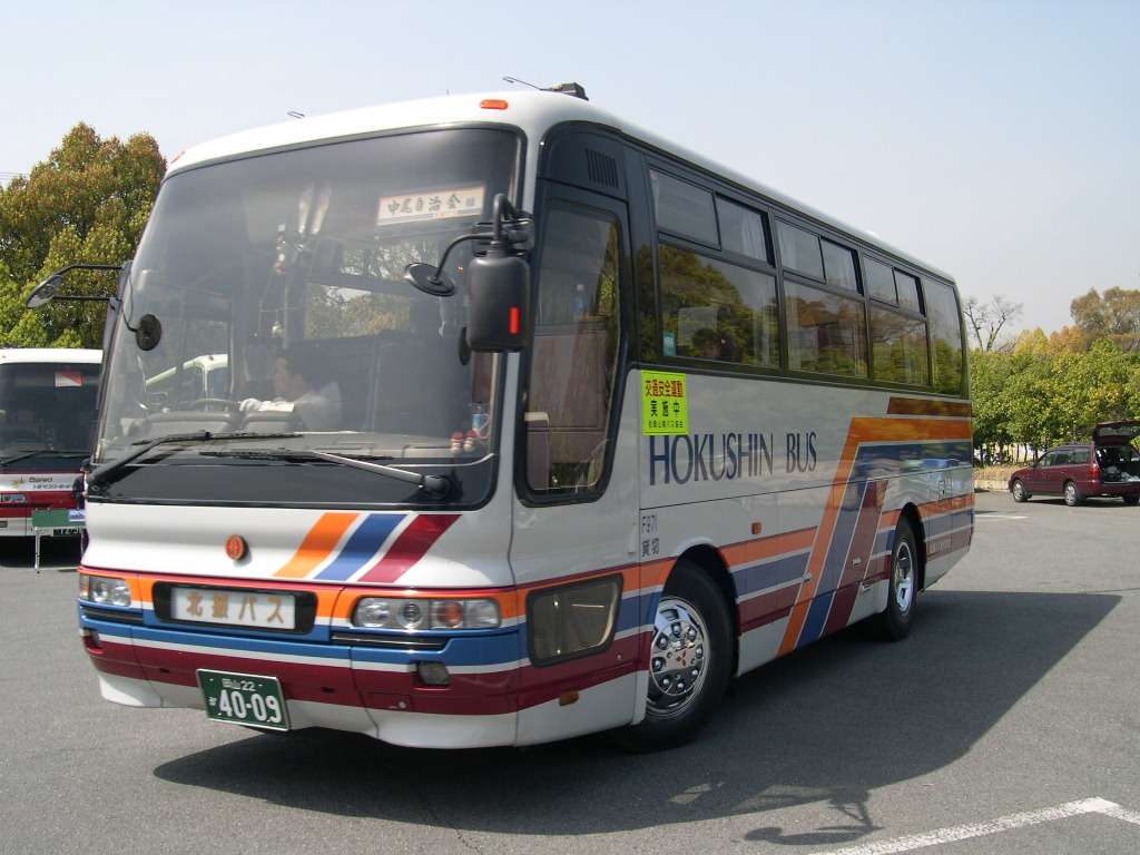 姫路城貸切バス駐車場にて 2004-4-10撮影